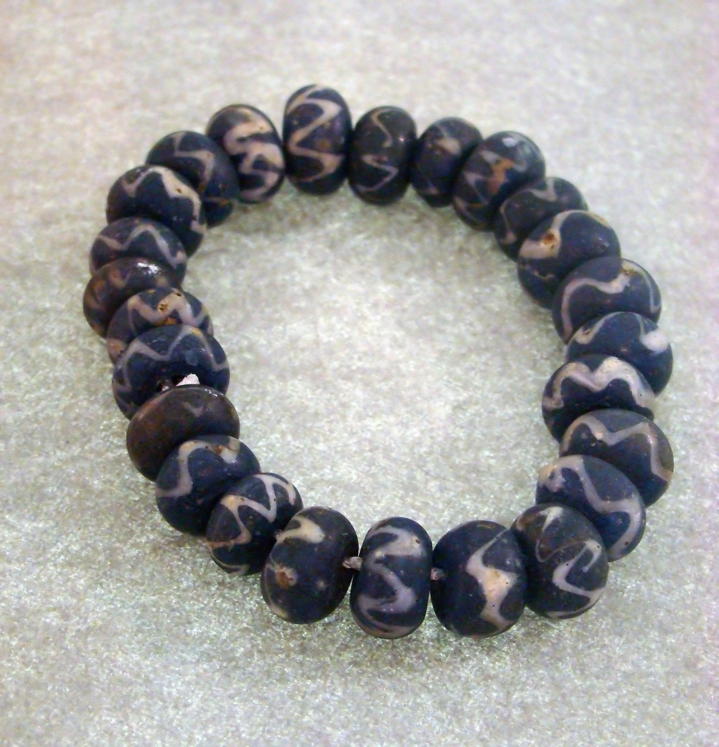 Kolie paciorków szklanych znalezione w osadzie obronnej w Wicinie. Muzeum Archeologiczne Środkowego Nadodrza w Świdnicy.